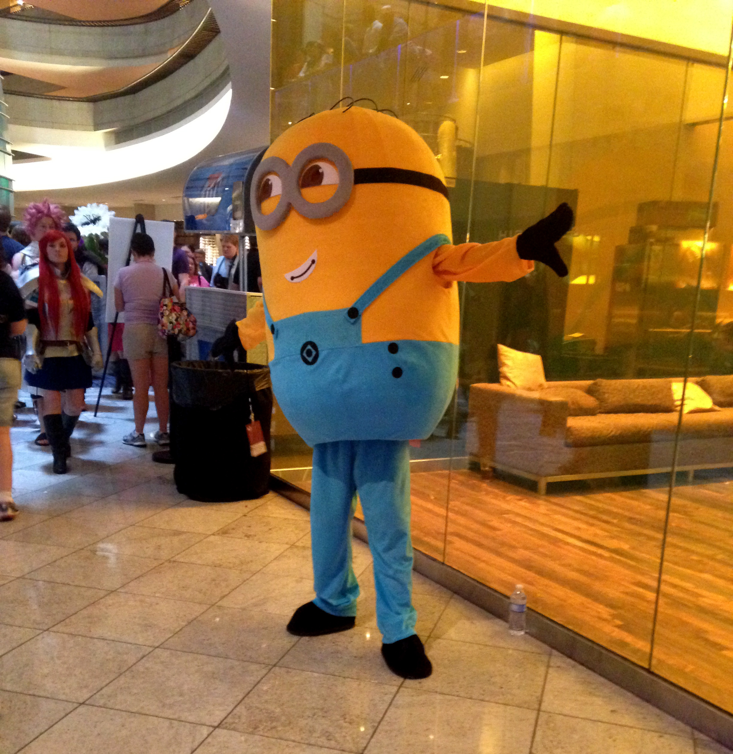 Cosplay at Dragon Con 2014.